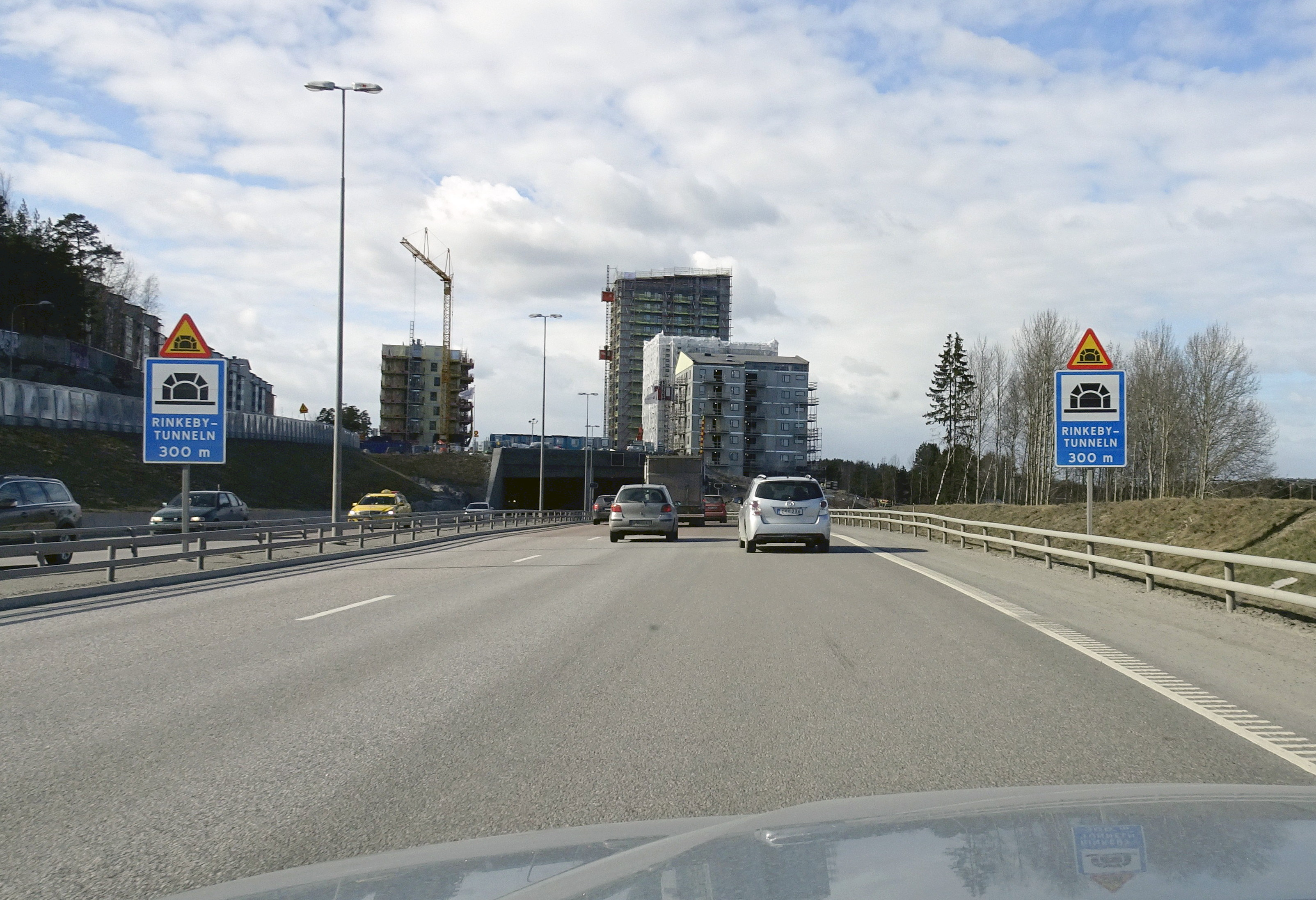 Rinkebytunneln från öster